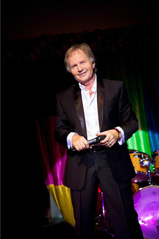 ЦДХ Москва 2013г.